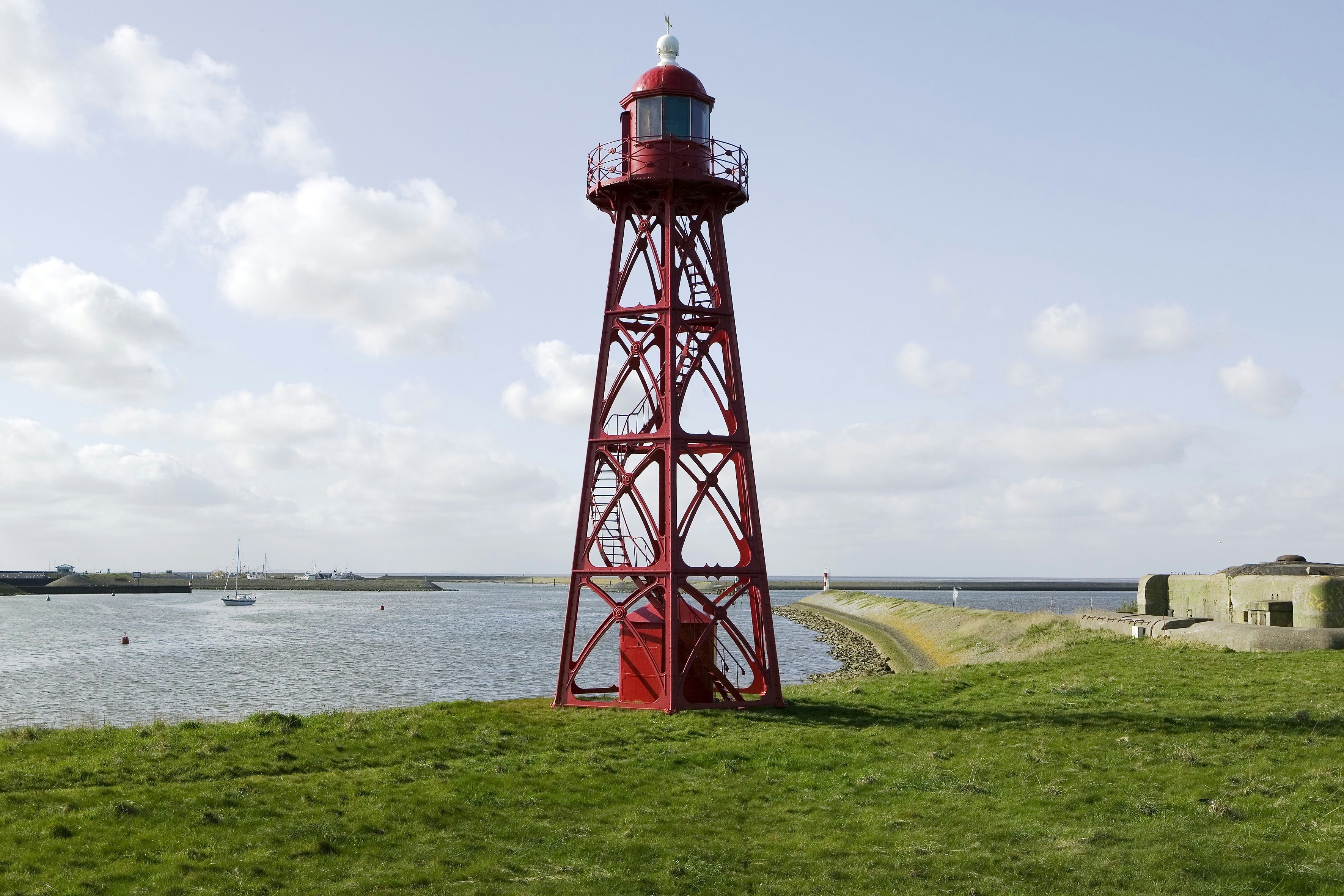 Stevinsluizen: Lichtopstand met een gietijzerenconstructie en op de achtergrond een kazemat